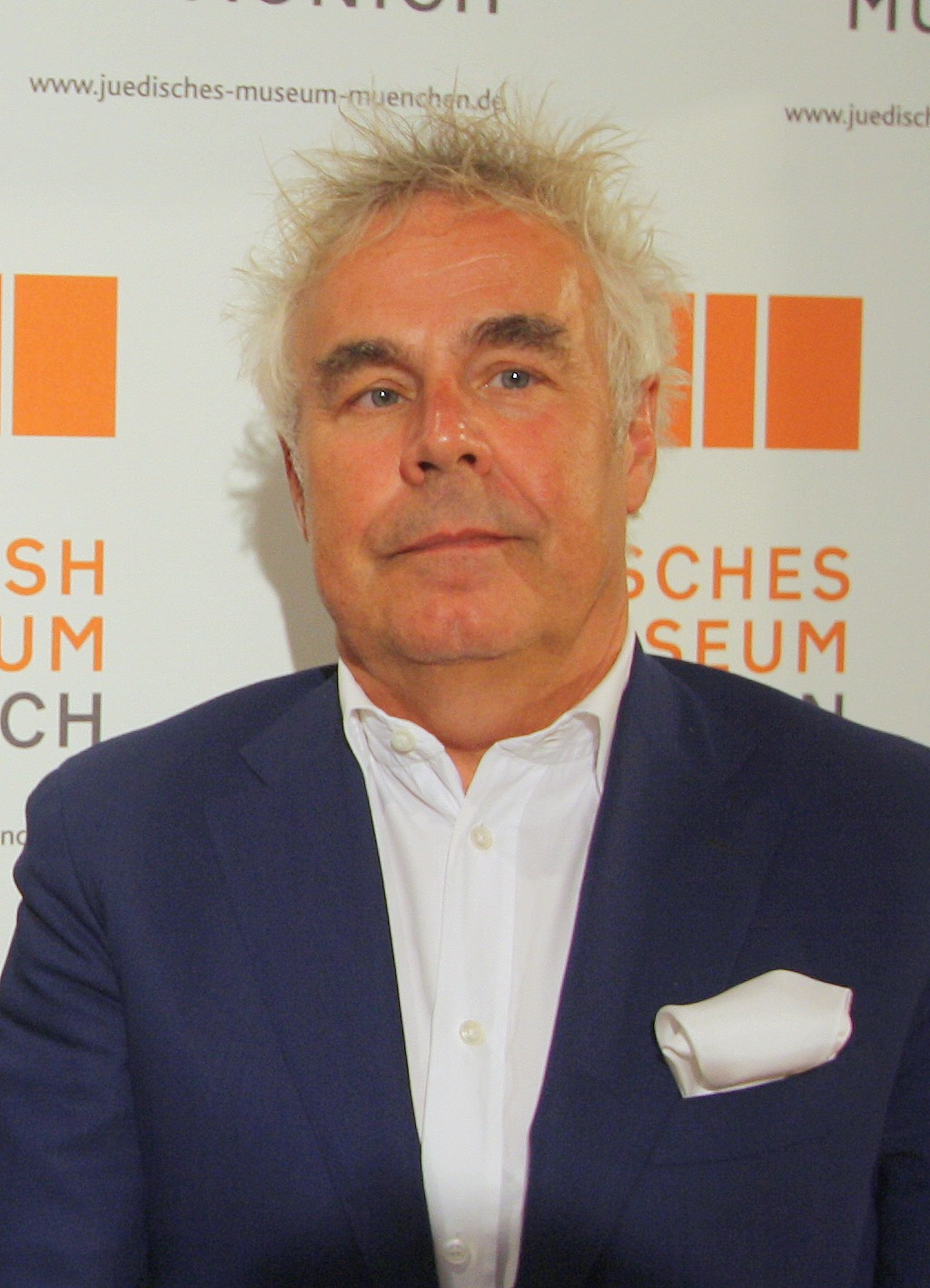 Curt Bernd Sucher, deutscher Theaterkritiker, Autor und Hochschullehrer, nach einer Veranstaltung im Jüdischen Museum München. Titel des Werks: "Curt Bernd Sucher am 13.09.2017 in München"